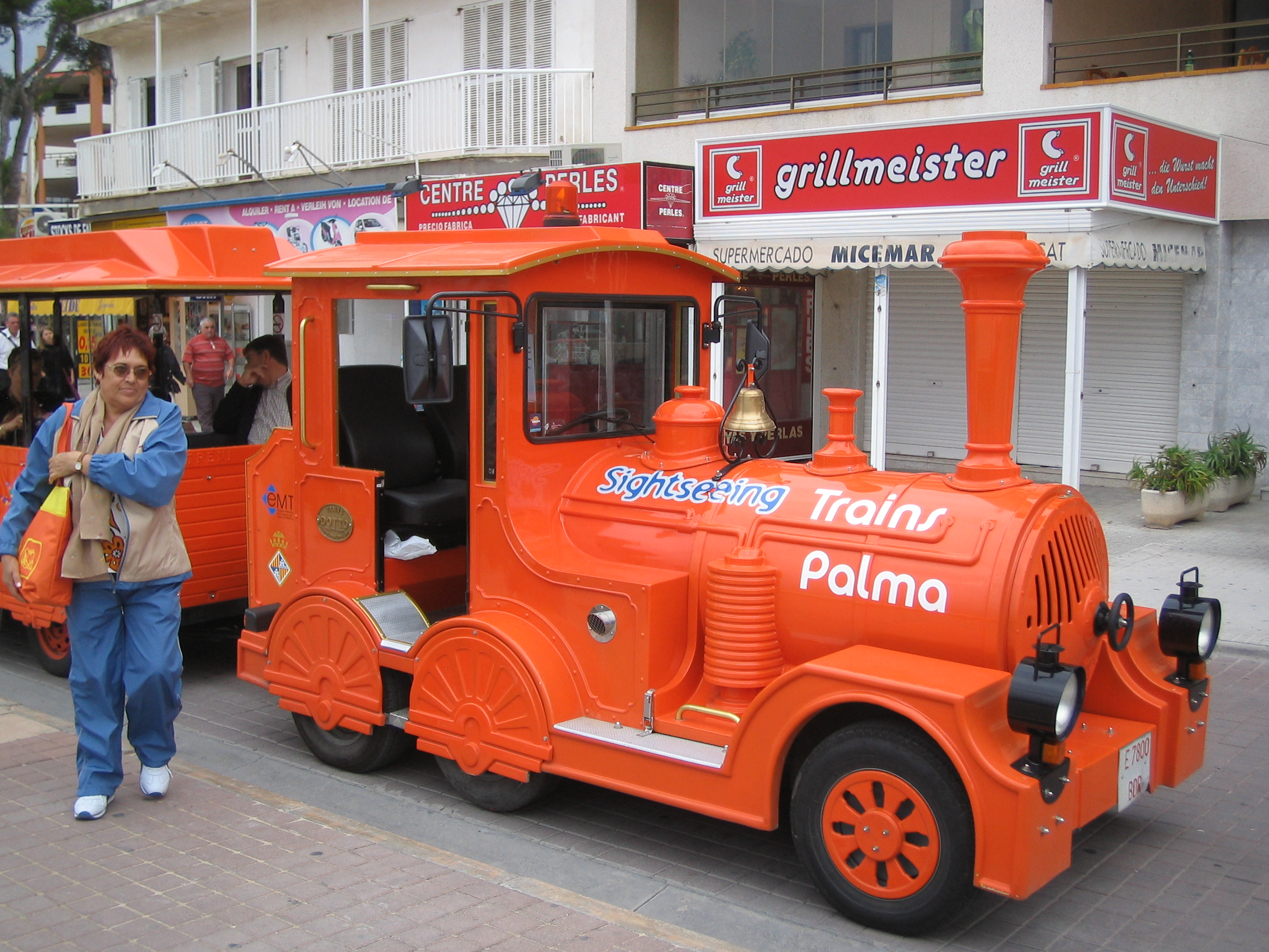 Trenecito turístico en el Arenal en Mallorca